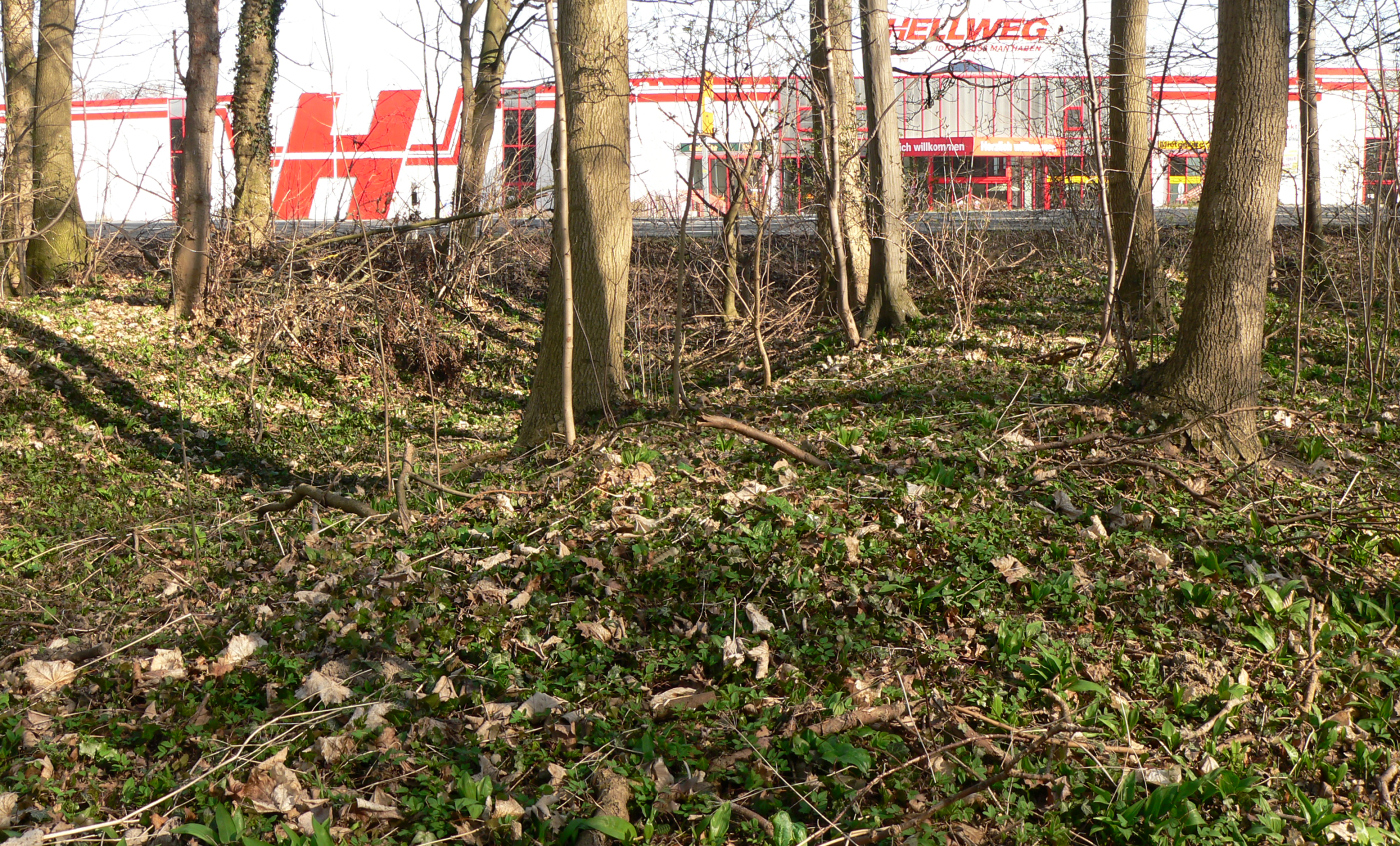 Flache Wälle der Bückethaler Landwehr nahe Bad Nenndorf, im Hintergrund die Gewerbeanlage, auf dessen Baugrund bei archäologischen Untersuchungen 2007 Reste der Landwehr entdeckt wurden.